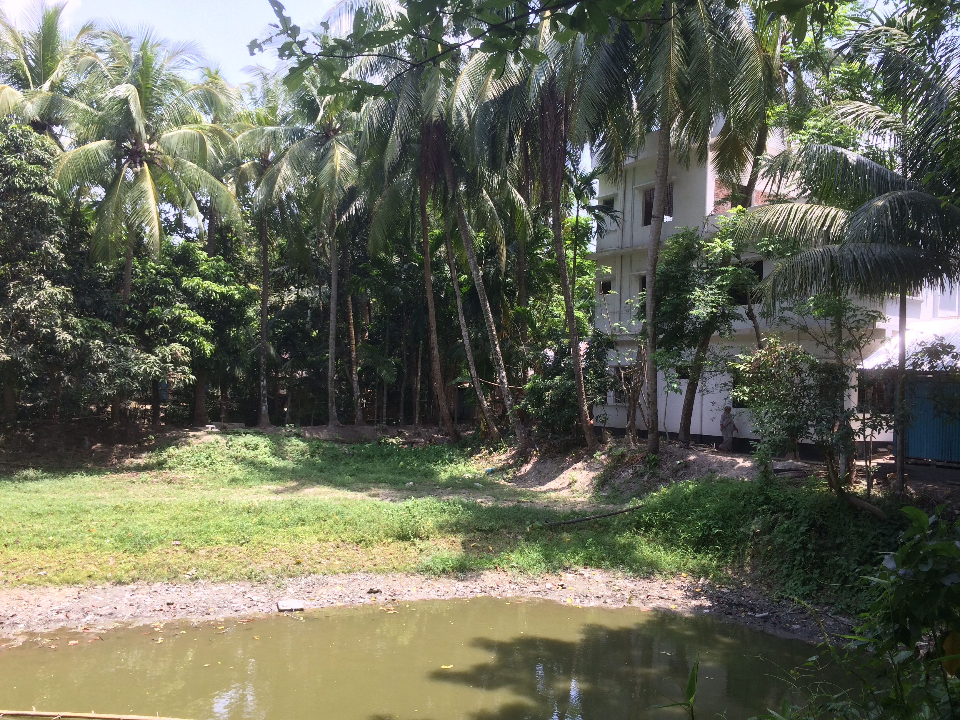 বিরাহিমপুরগ্রাম